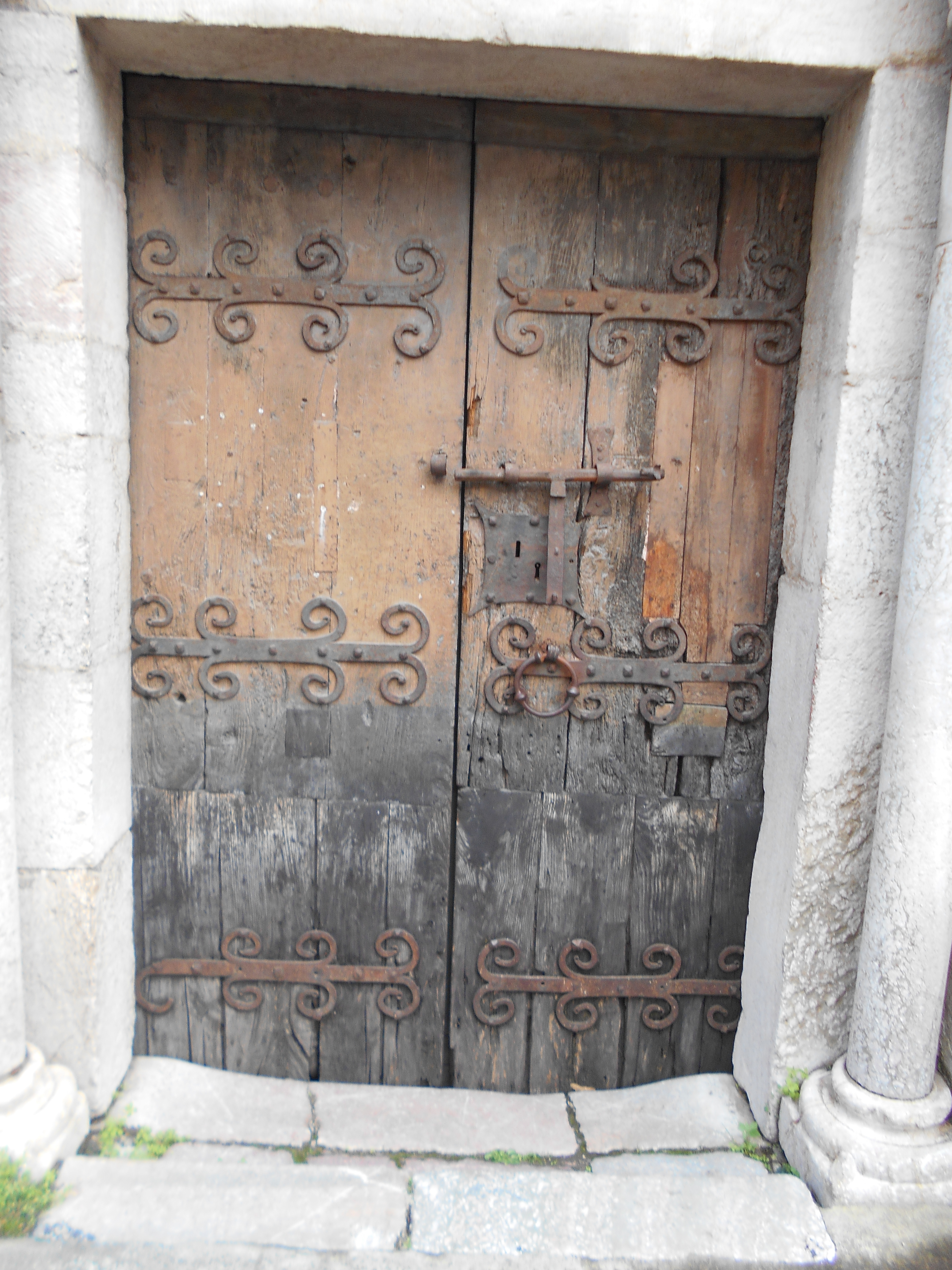 Ferramenta romànica de les portes de Sant Jaume de Vilafranca de Conflent-Porta oriental, petita